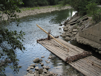 Un RAI a la Pobla de Segur. Any 2006. Pobla de Segur